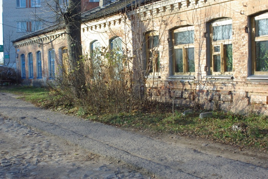 Одно из даний в г. Невеле.